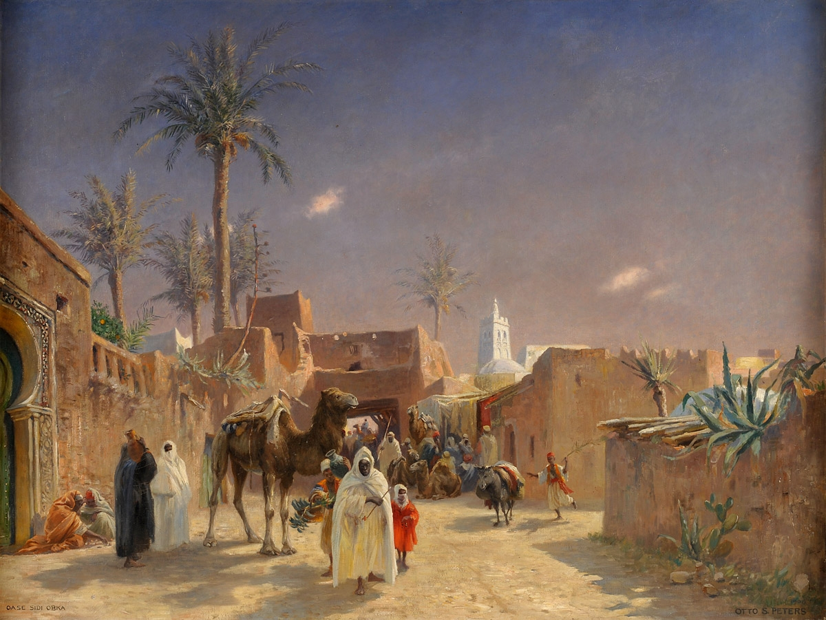 Oase Sidi Obka (= Sidi Okba). Signiert Otto S. Peters. Betitelt. Öl auf Leinwand, 87 x 114 cm.